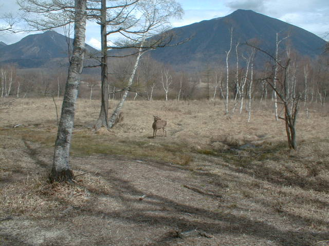 Volcan Nantai